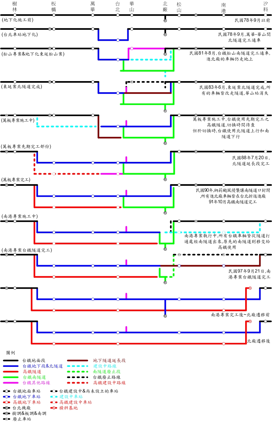 台北鐵路地下隧道演變過程